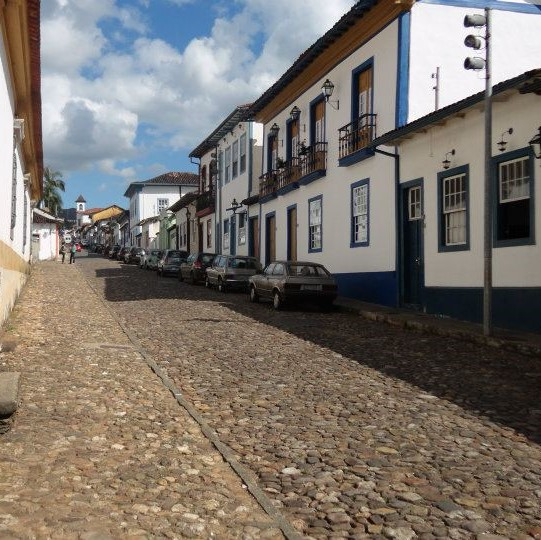 Centro